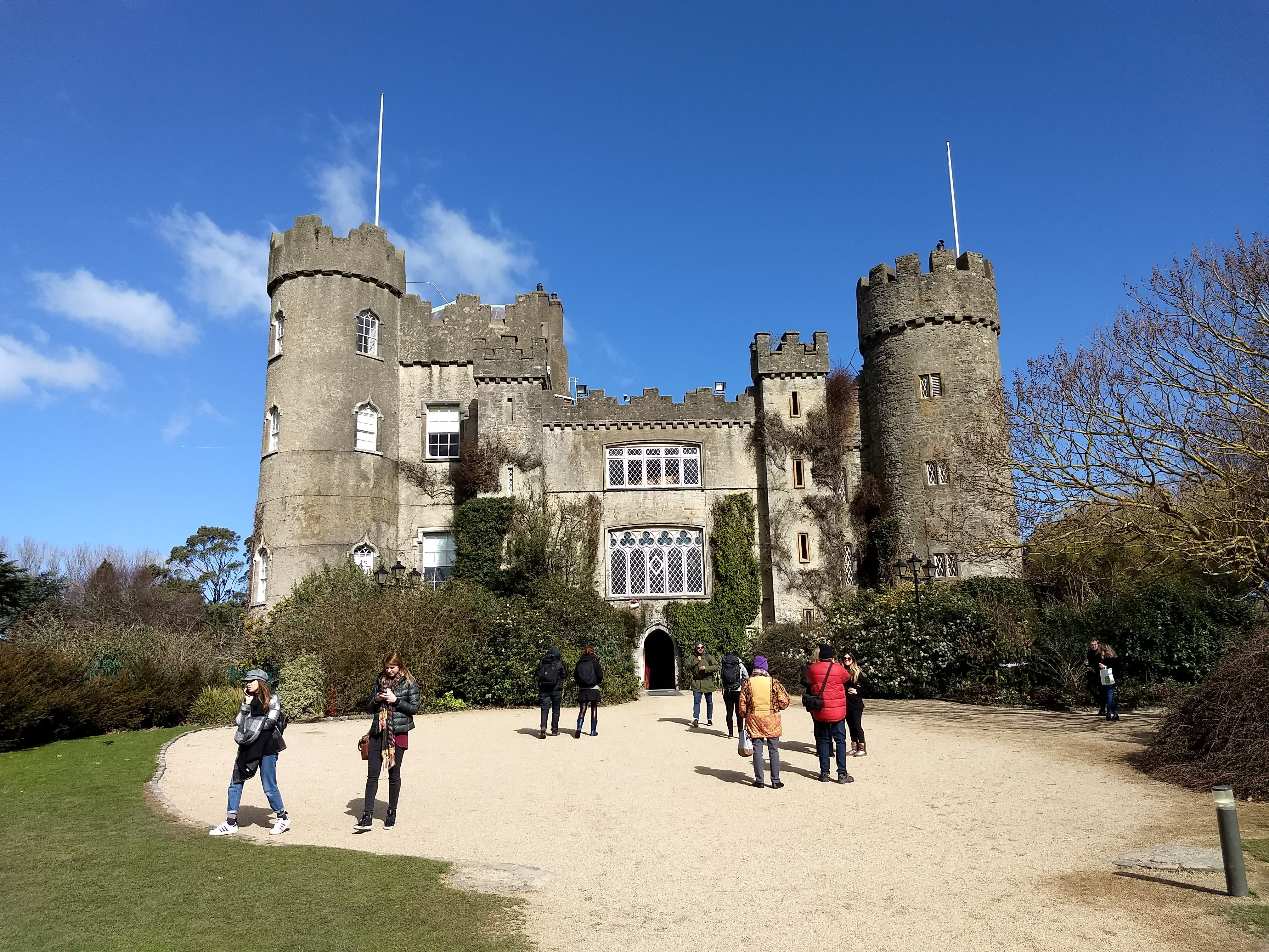 visão fontal do castelo de Malahide